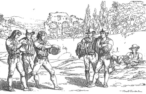 Trasteverini giocando a Ruzzica in un'incisione all'acquaforte di Bartolomeo Pinelli del 1809. Dimensione battuta:290 x 210 mm; Dimensione foglio:390 x 265 mm.